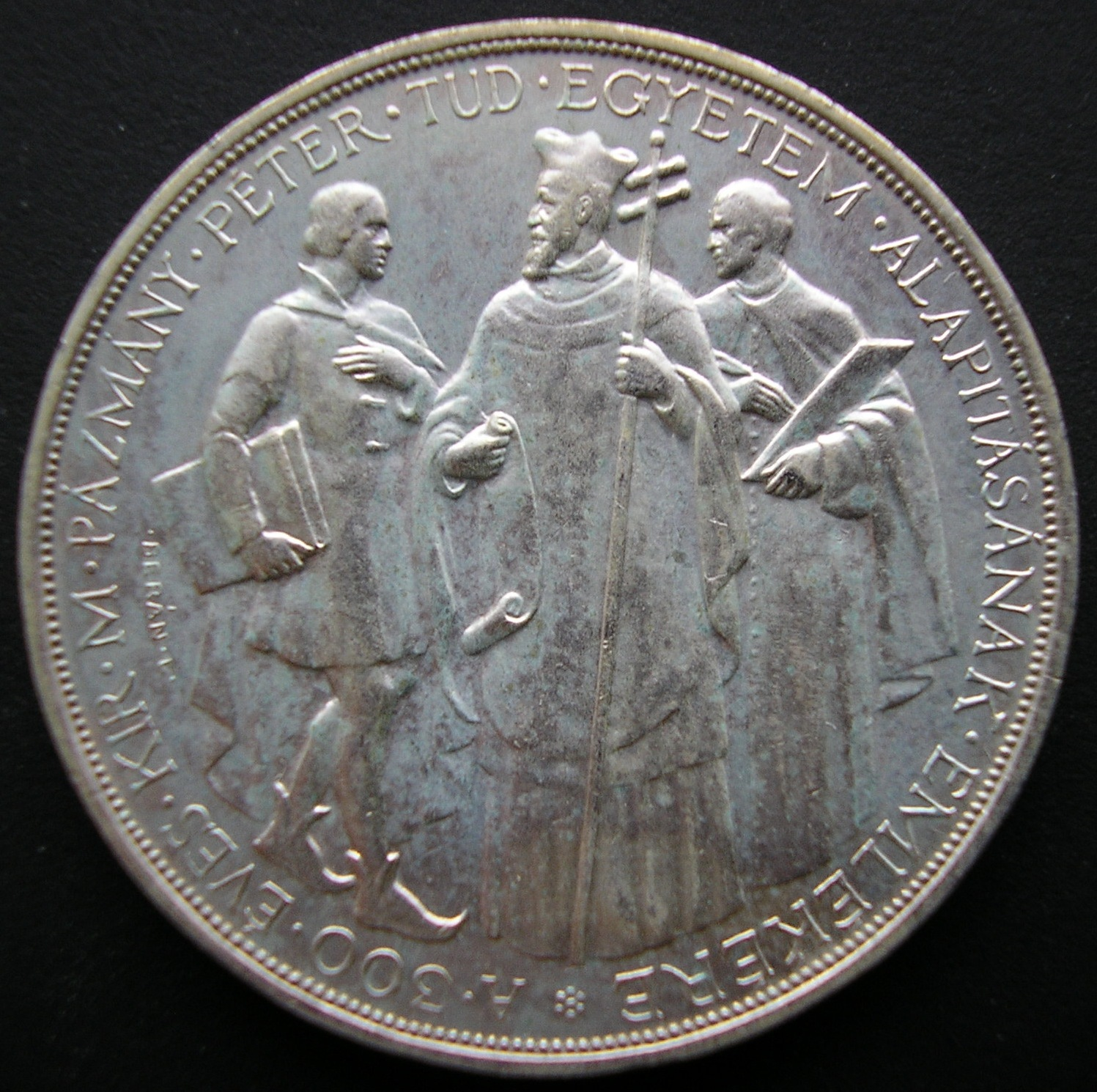 Hungary 2 Pengő Pázmány Péter 1935